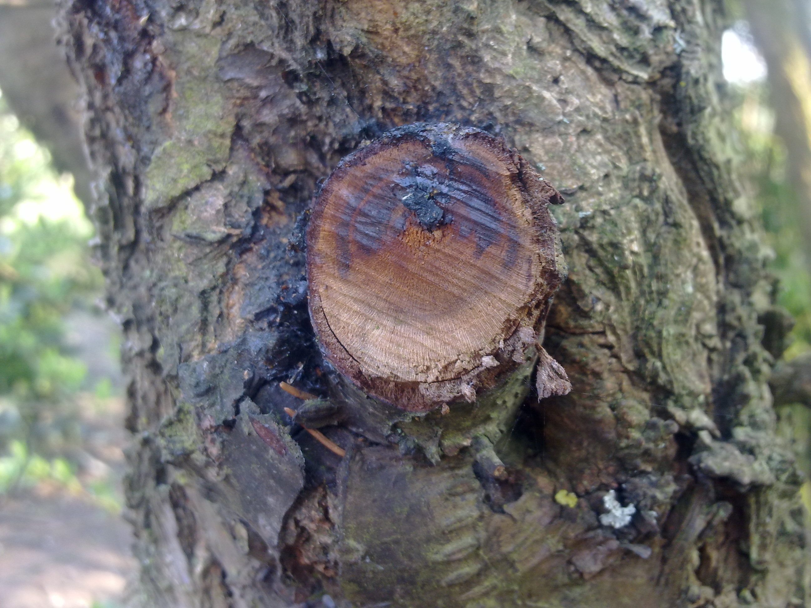 Vieille plaie de taille, partiellement couverte de résine, sur le tronc d'un cerisier sauvage (je suis légèrement incertain sur l'espèce) à Grez-Doiceau après la coupe d'une branche.